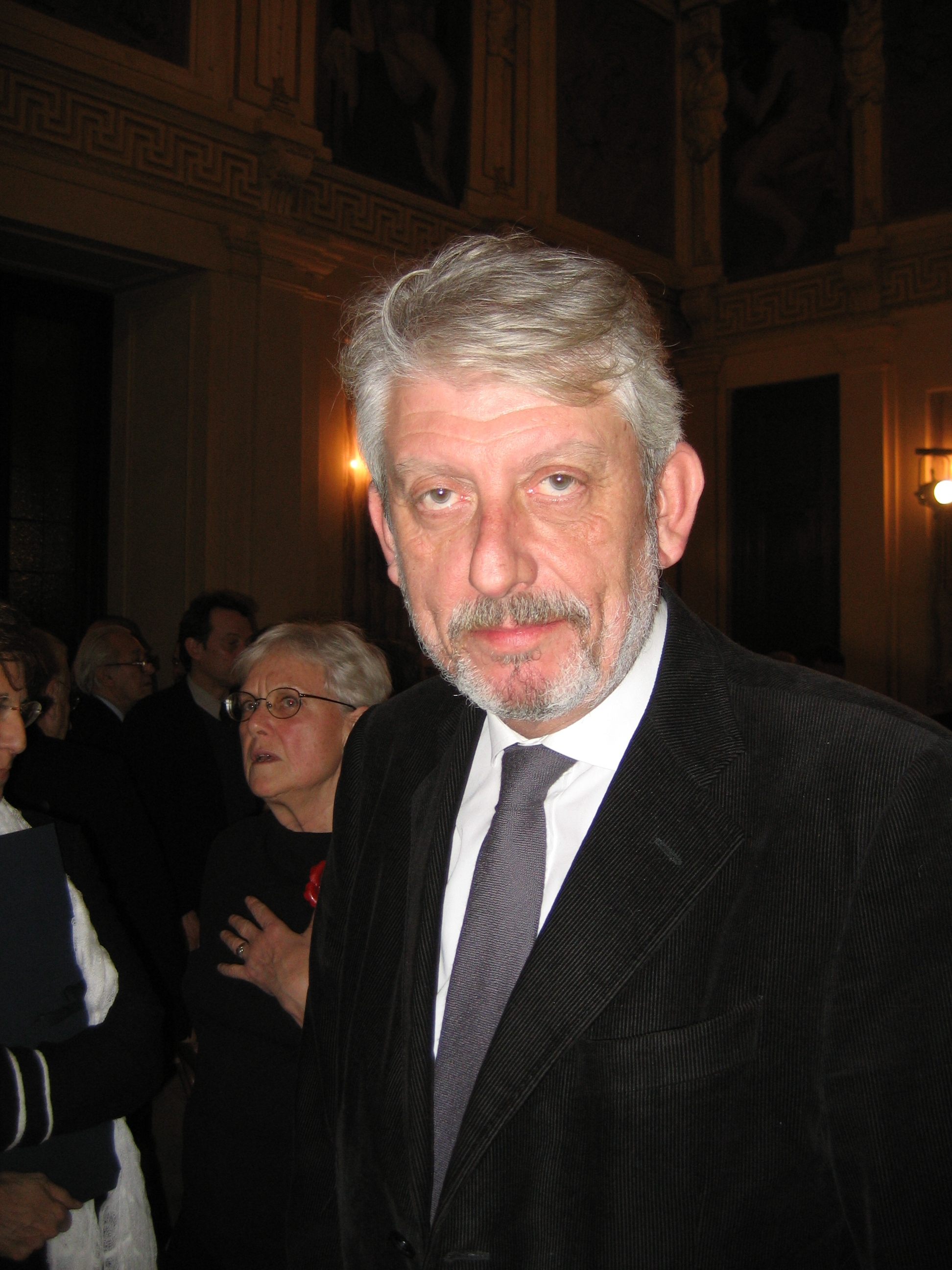 Massimo Bordin alla premiazione del Premiolino 2009